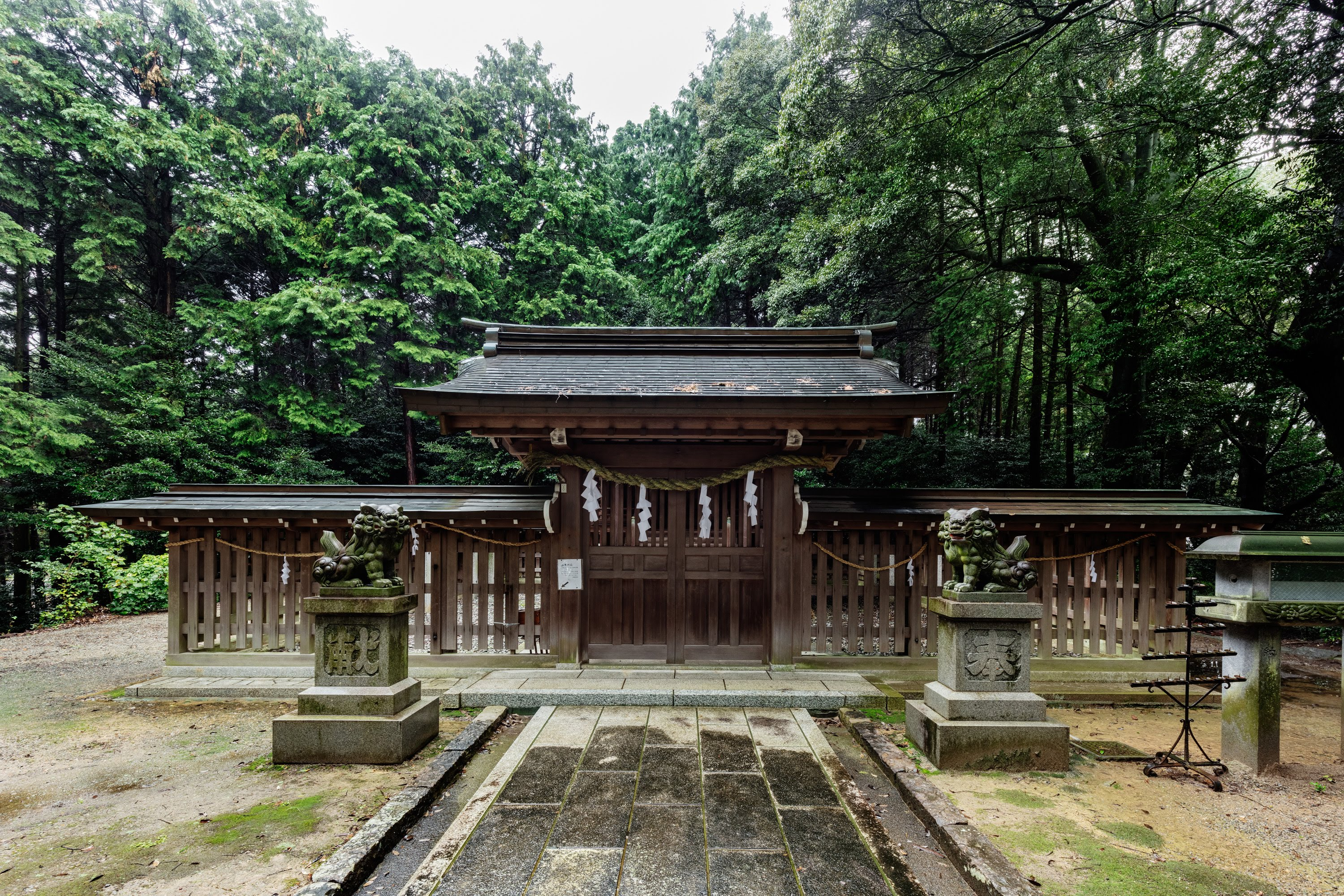 村国神社 (各務ヶ原市)-本殿